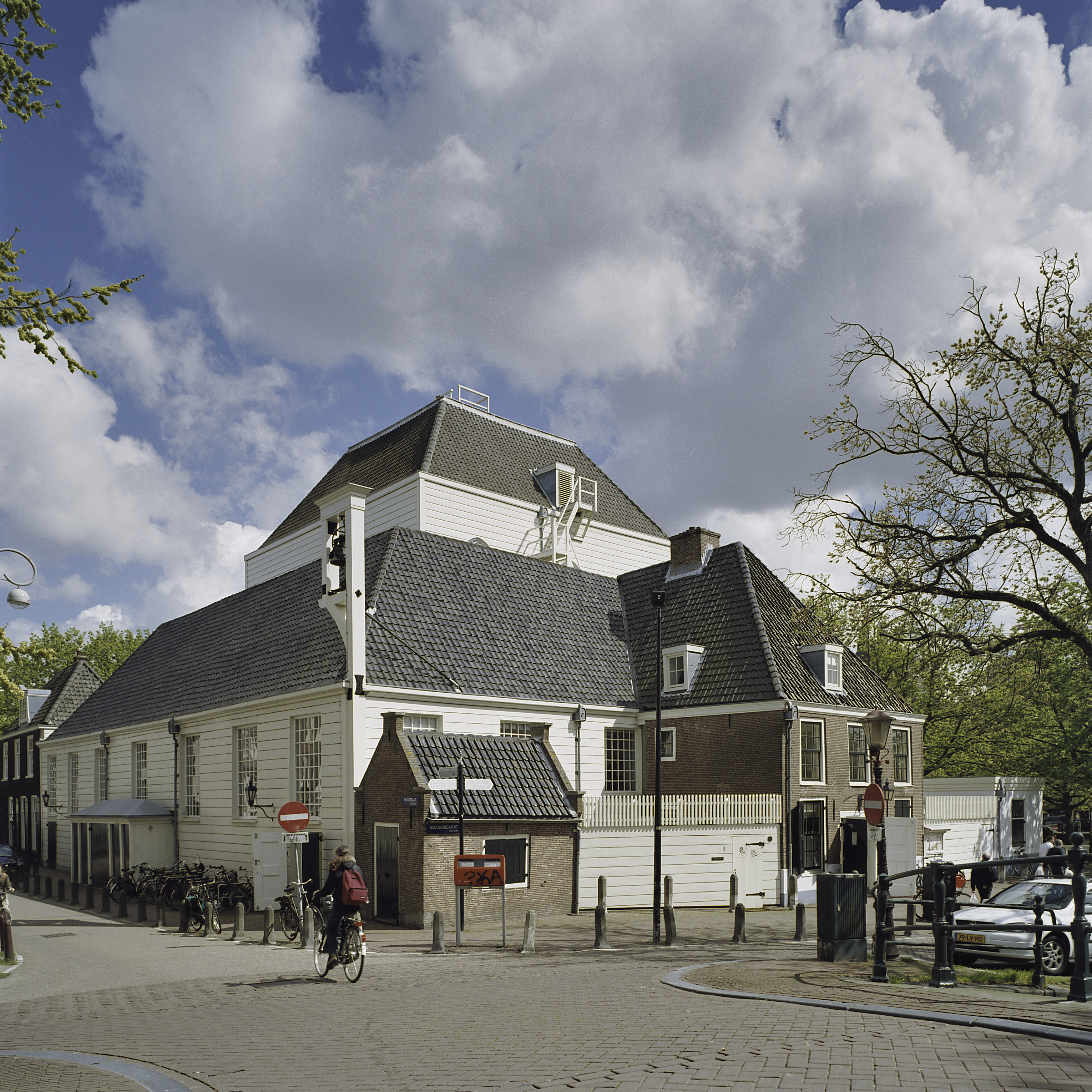 Hervormde Amstelkerk: Overzicht op de achterzijde van houten kerk (opmerking: Gefotografeerd voor Monumenten In Nederland Noord-Holland)